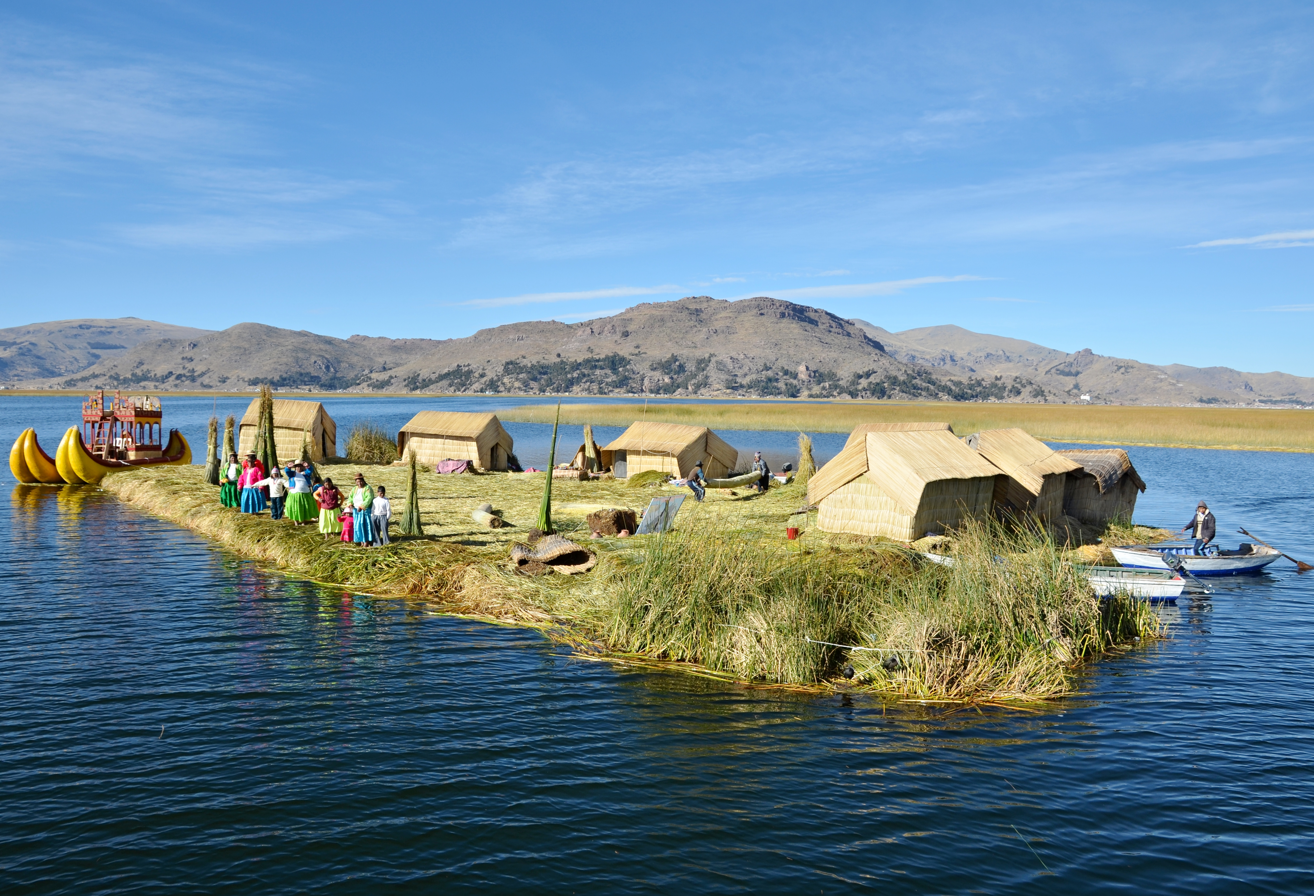 Jezero Titicaca - plovoucí ostrovy Uros